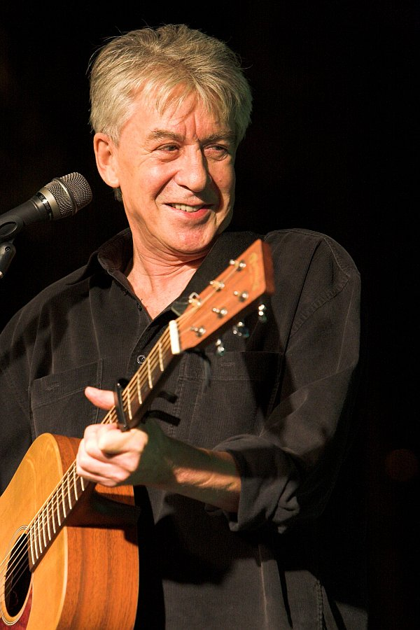 Cseh Tamás (Bakáts tér, Budapest)